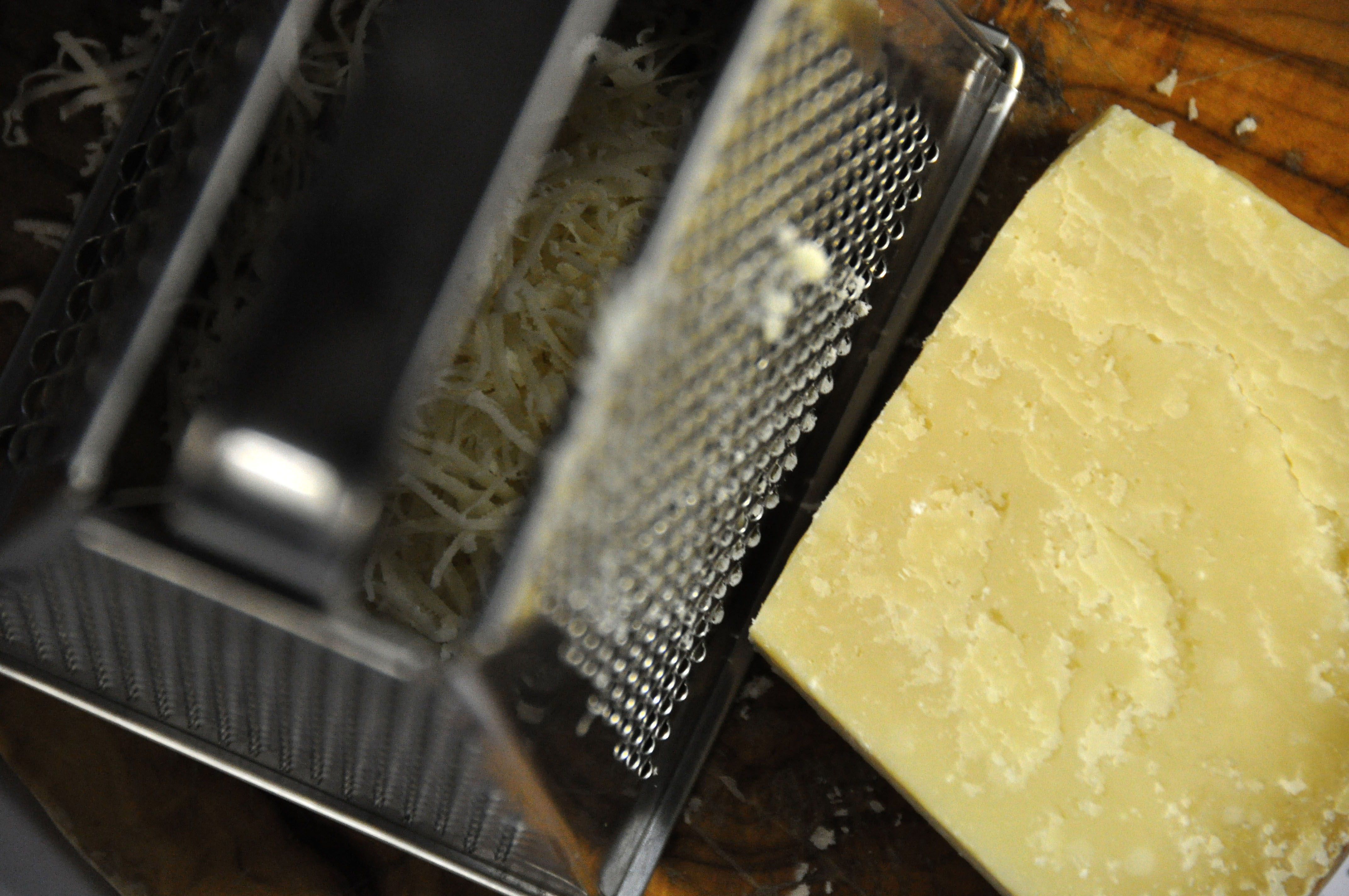 Parmesan